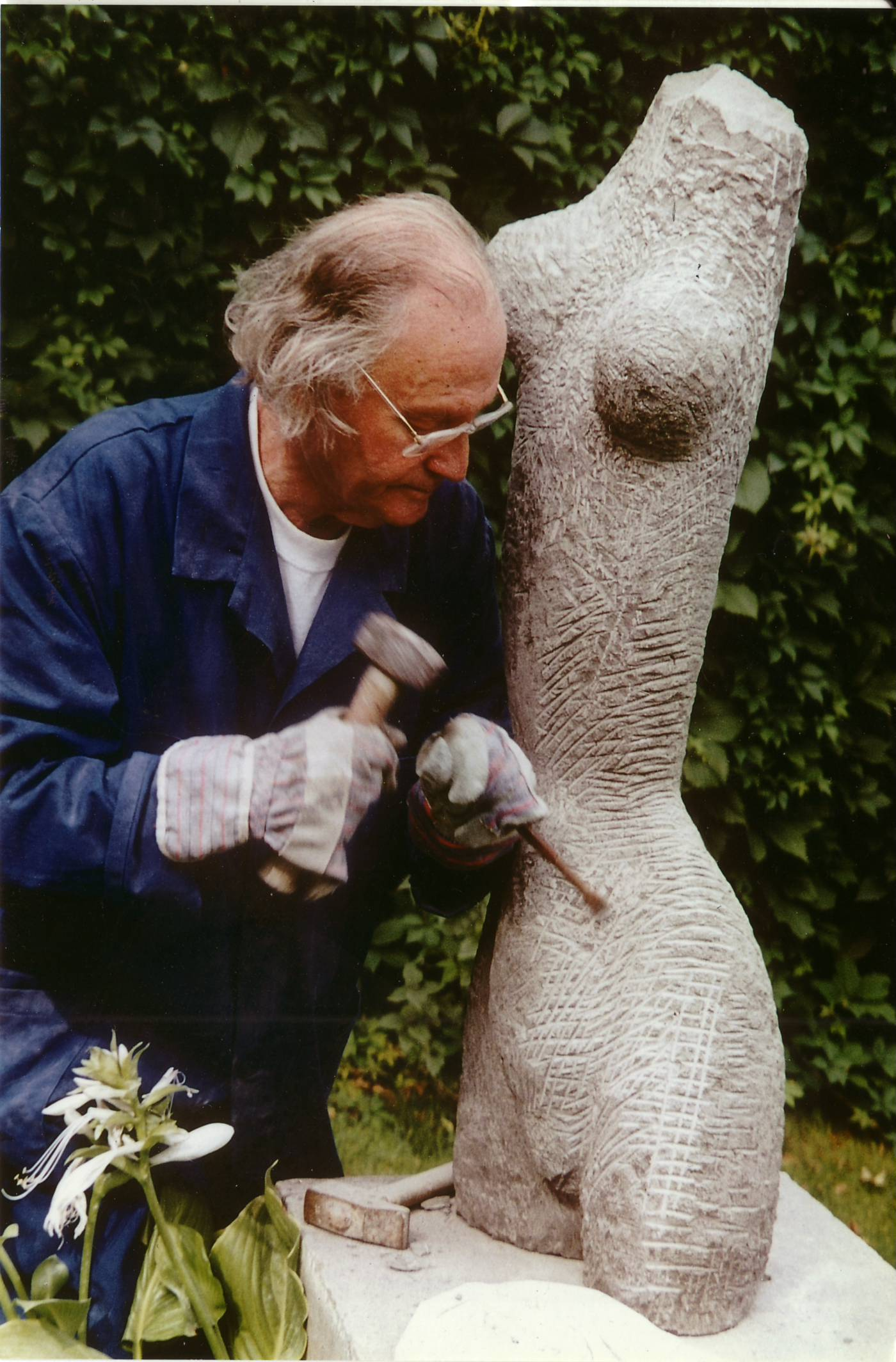 Achiam, en train de sculpter Torse de Danseuse (Basalte)